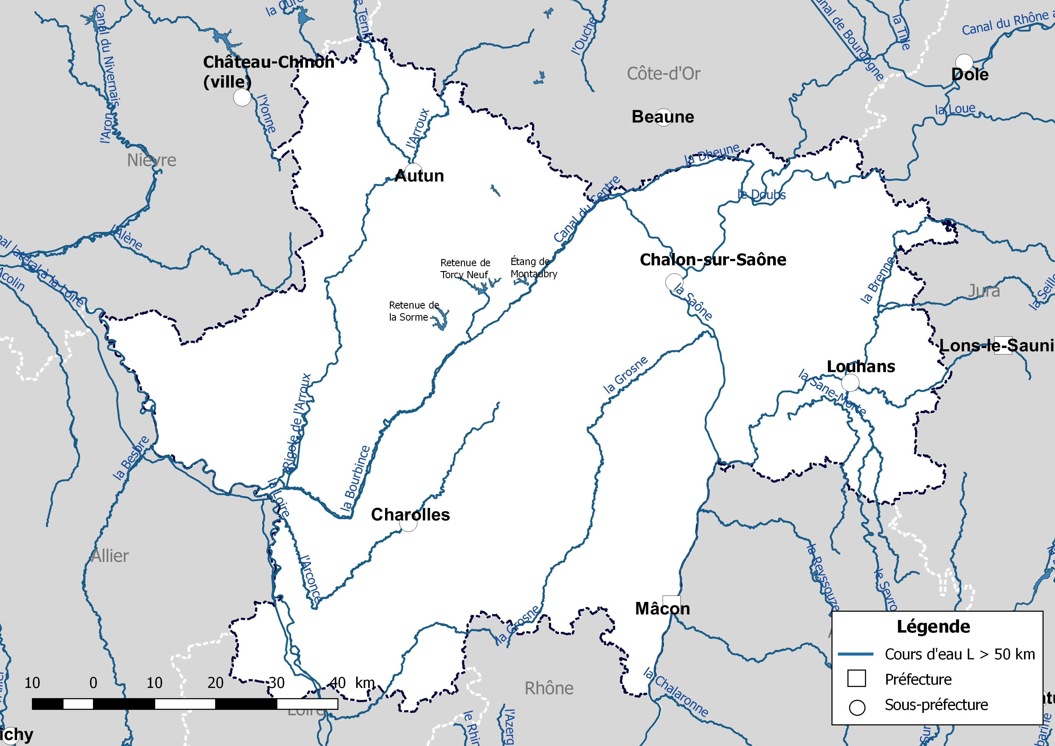 Carte des cours d'eau de longueur supérieure à 50 km drainant le département de Saônbe-et-Loire (France).